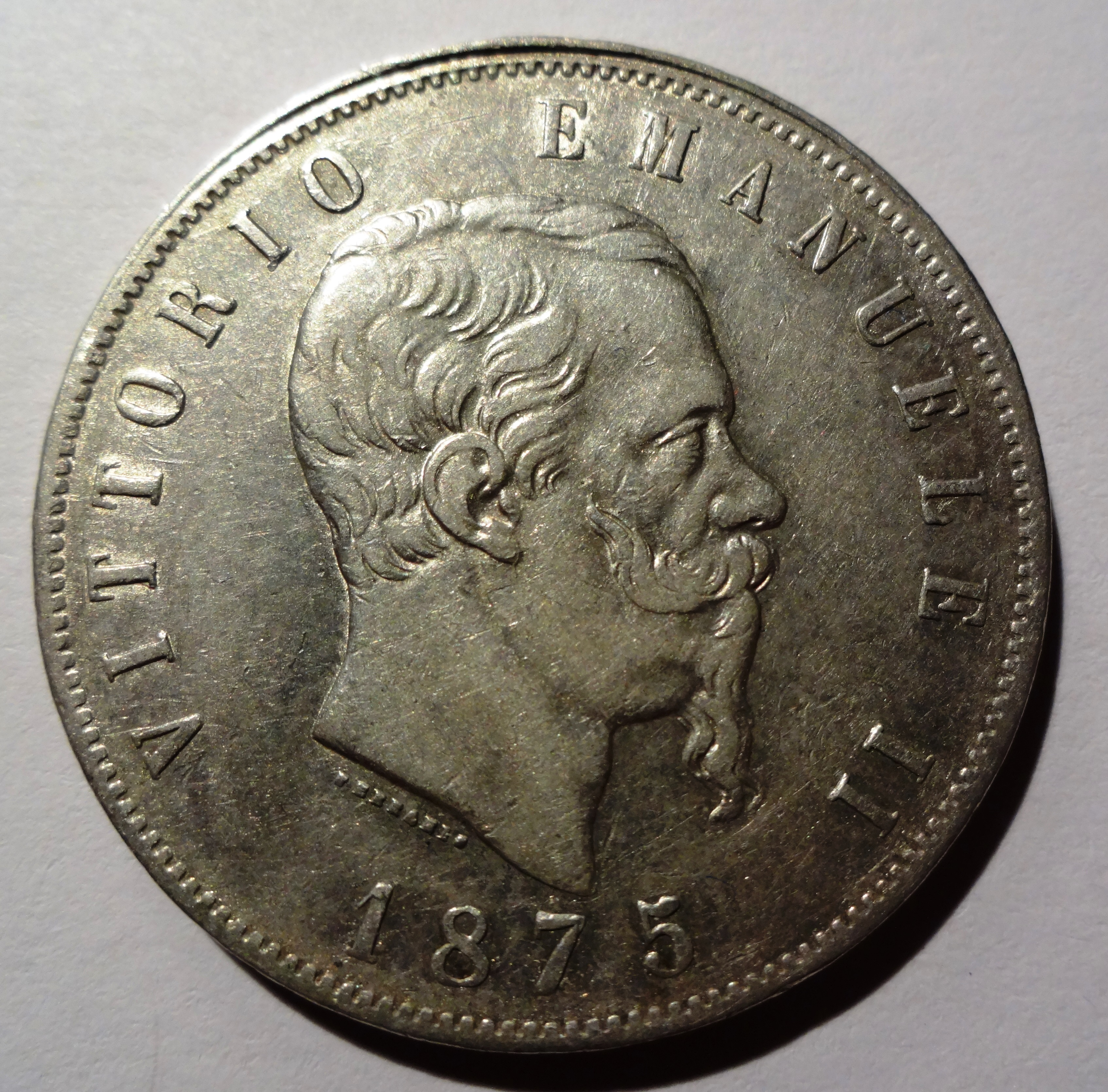 Vittorio Emanuele II. auf 5 Liremünze, Jahr 1875